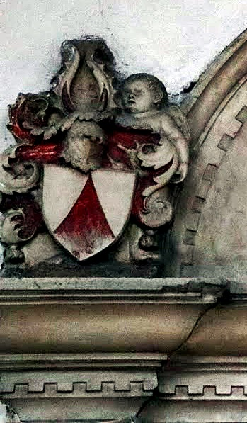 Christoph Langenmantel vom Sparren, Grabstein Franziskanerkirche Ingolstadt, Detail, Familienwappen